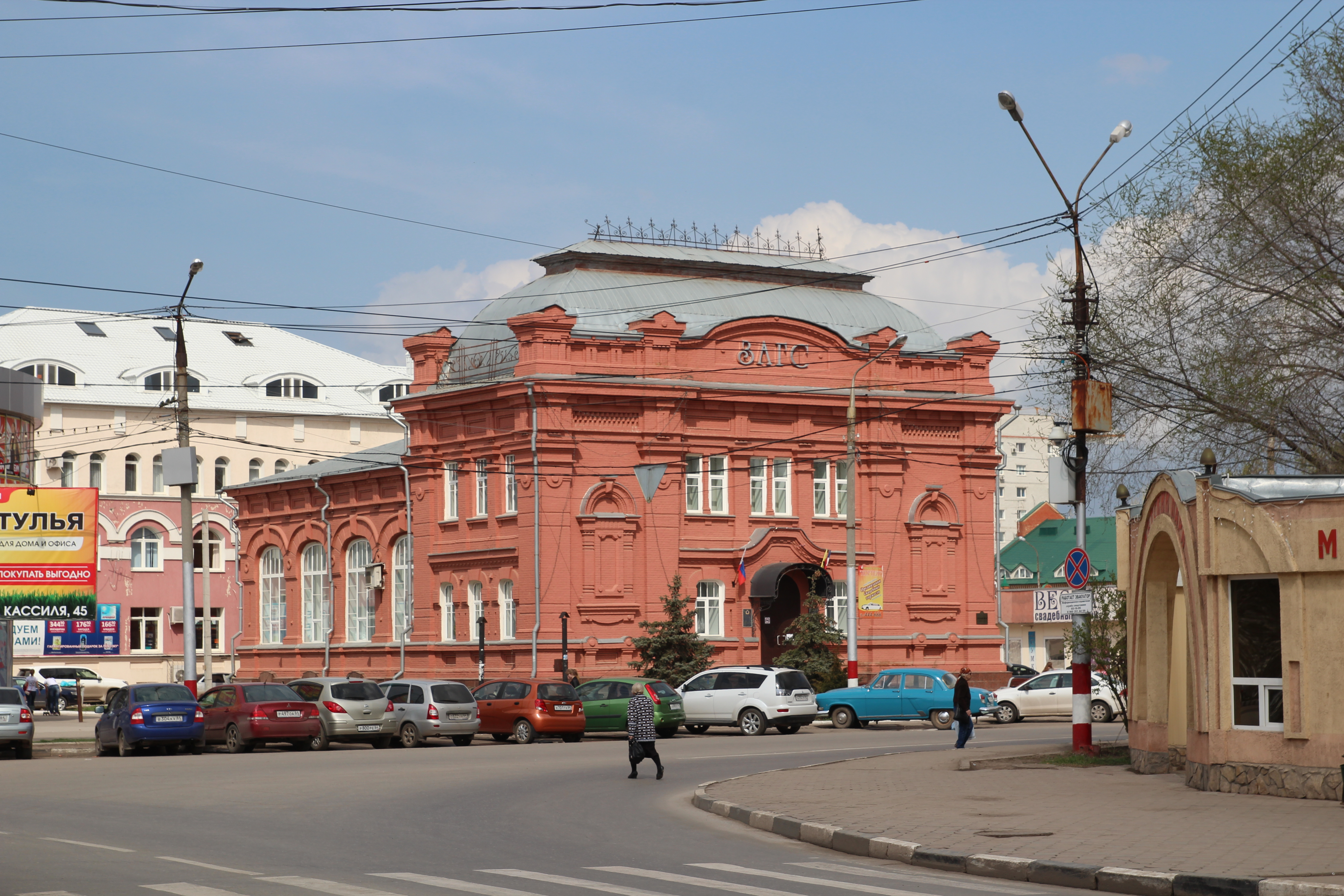 Здание хлебной биржи: площадь Свободы, 3, Энгельс, Саратовская область